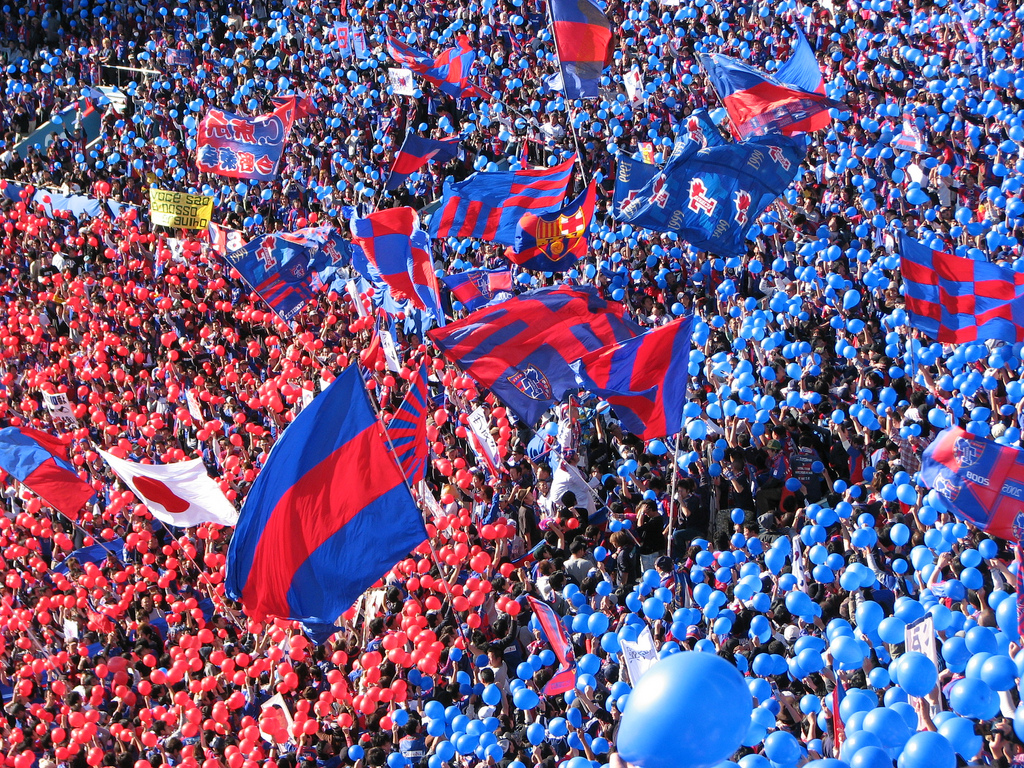 FC東京 vs. 川崎フロンターレ